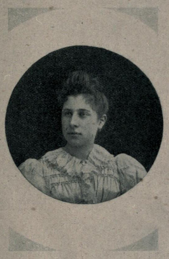 Photographie représentant Lya Berger, d'après Alphonse Séché (éd.): Les muses françaises, T. 2, Paris 1908, p. 21